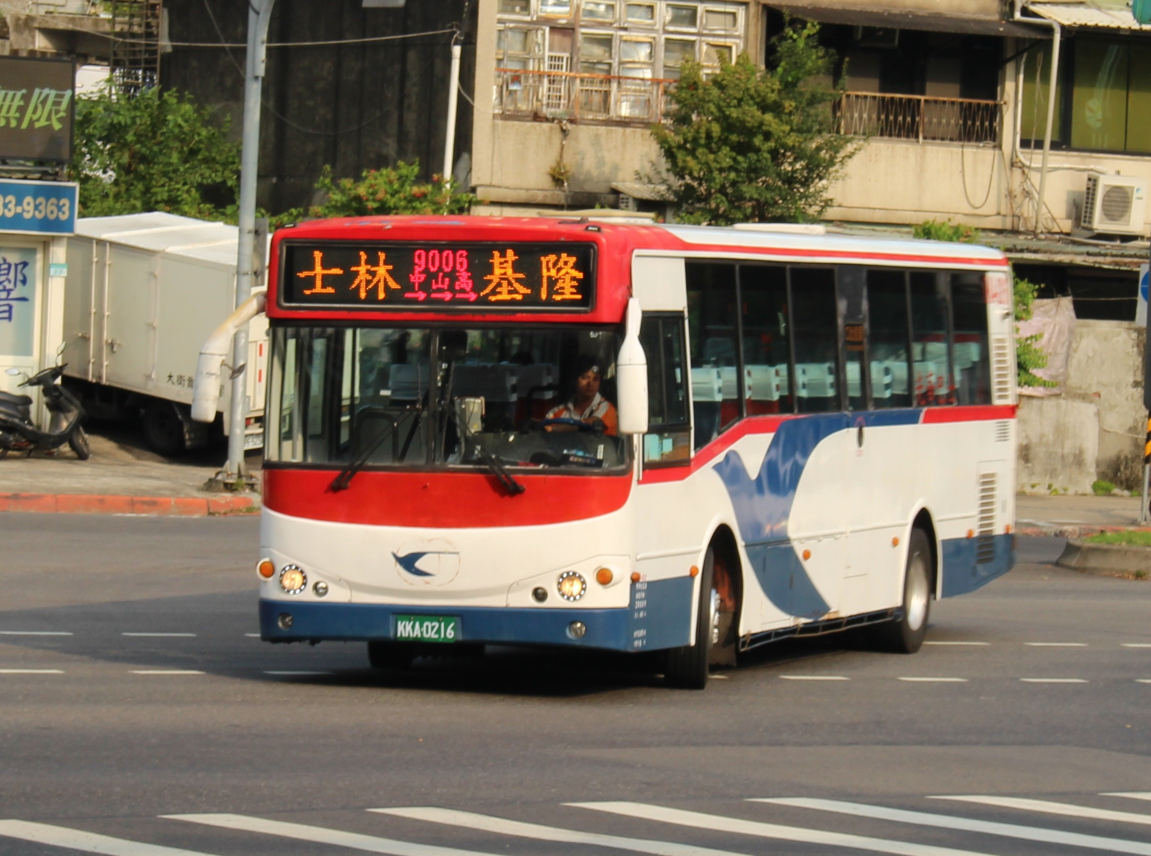 光華巴士日野RN8JRSA大客車KKA-0216。